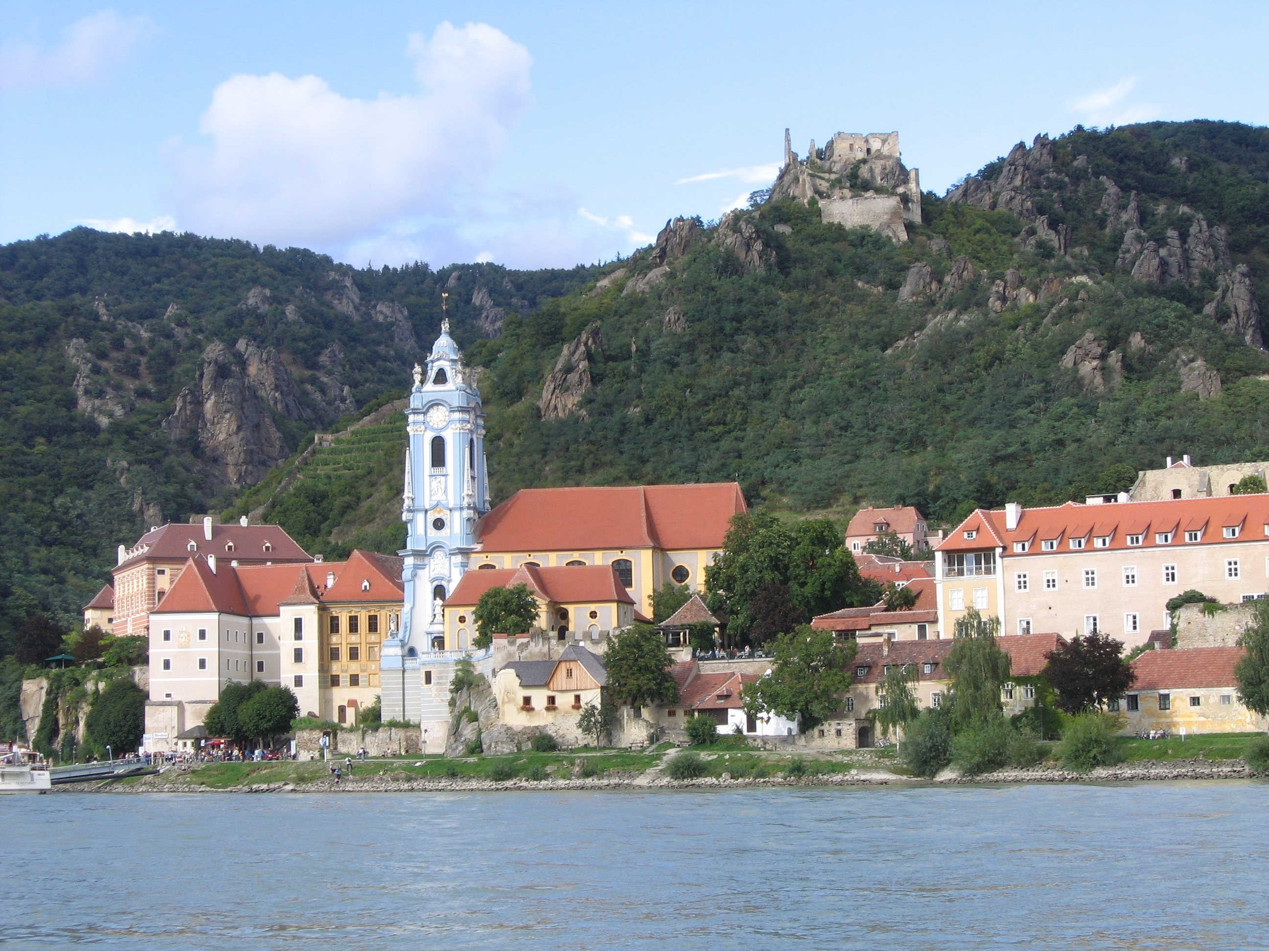 Dürnstein, Austria